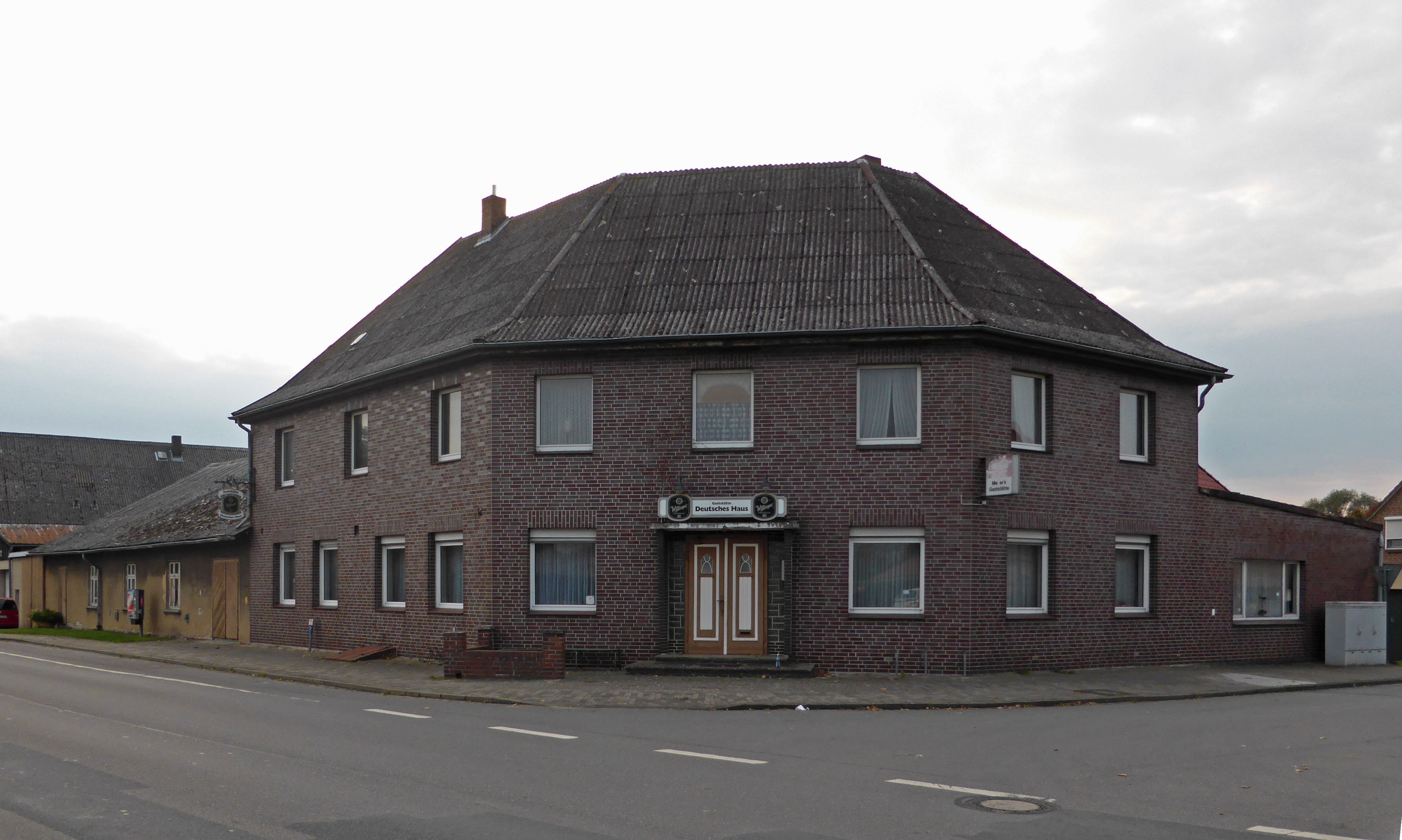 Gaststätte "Deutsches Haus" in Schönewörde.